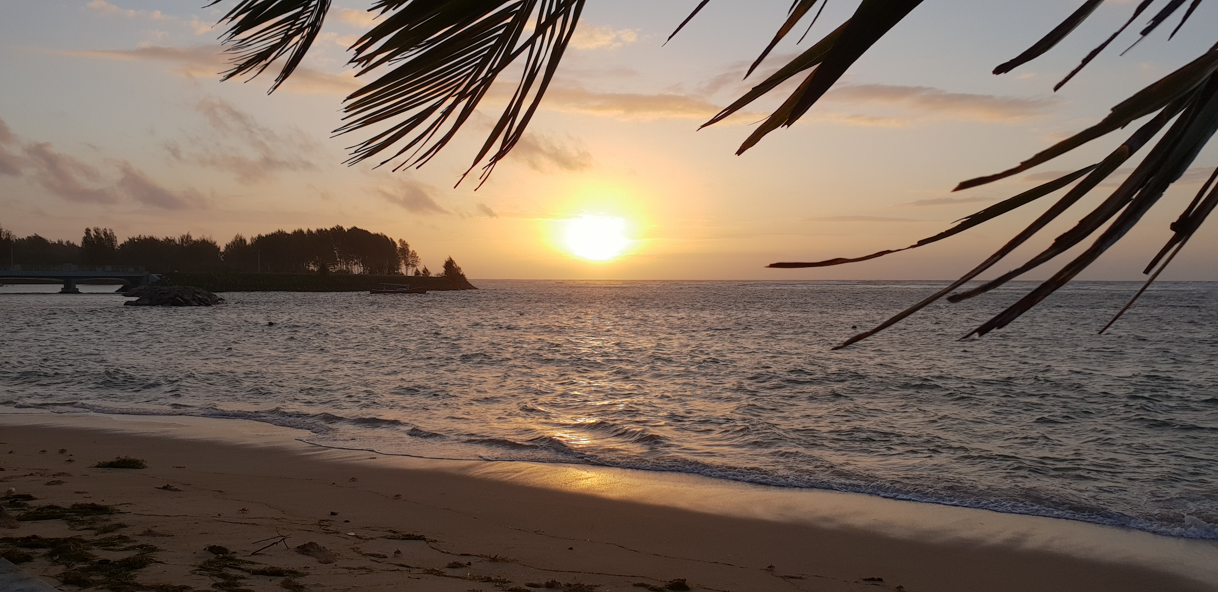 MAHE - Anse aux pins 4